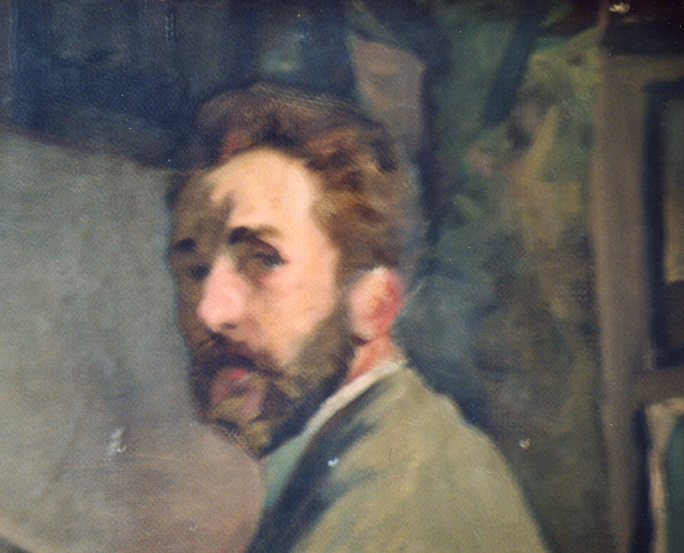 Emile Delpérée, autoportrait